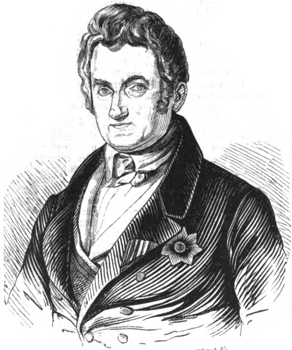 Friedrich von Blittersdorf, badischer Politiker, 1845.